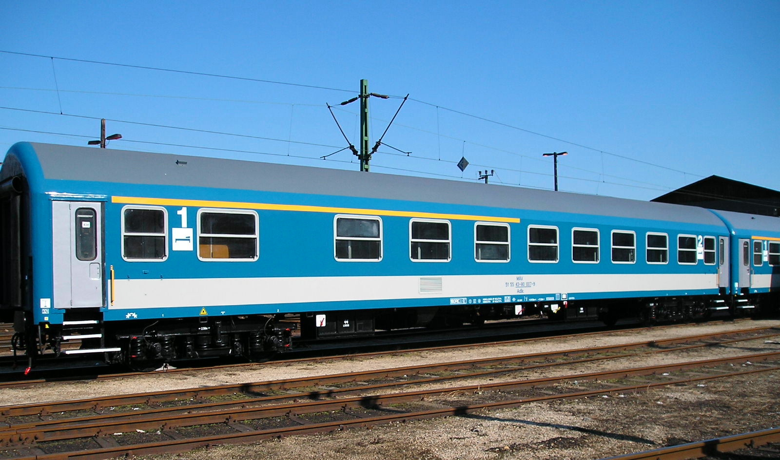 MÁV AcBc 43-80